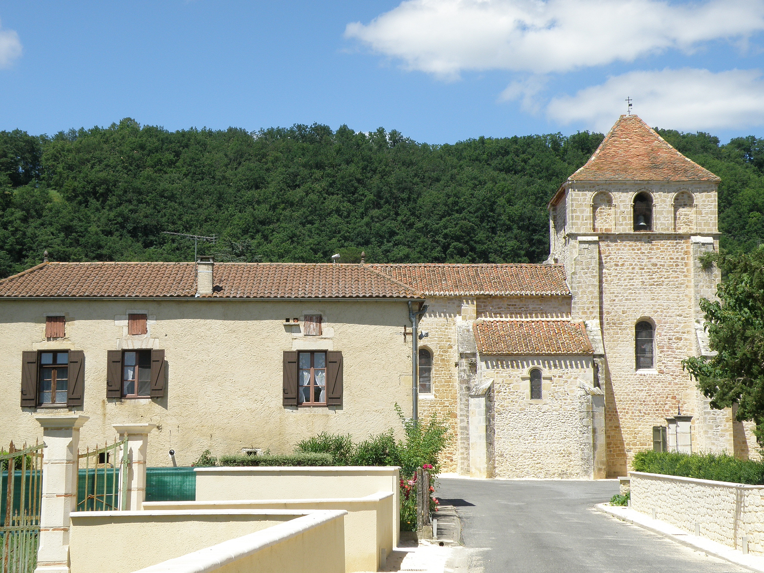 Pescadoires, village et commune situés dans le sud-ouest du département du Lot (région Midi-Pyrénées, France), sur la rive gauche de la rivière Lot. Aspect du village, avec église Saint-Pierre-ès-Liens.